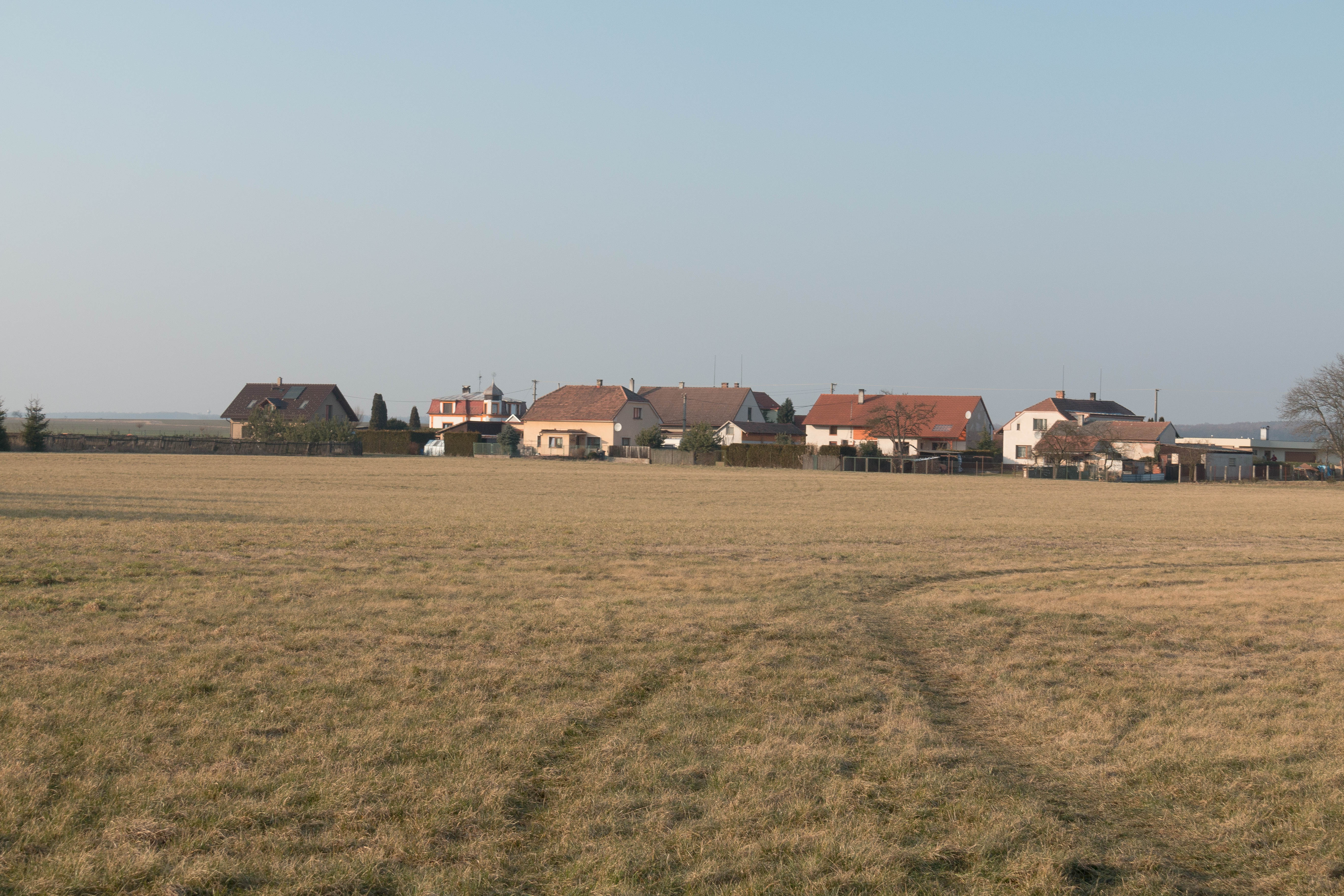 Pohled na Přelovice